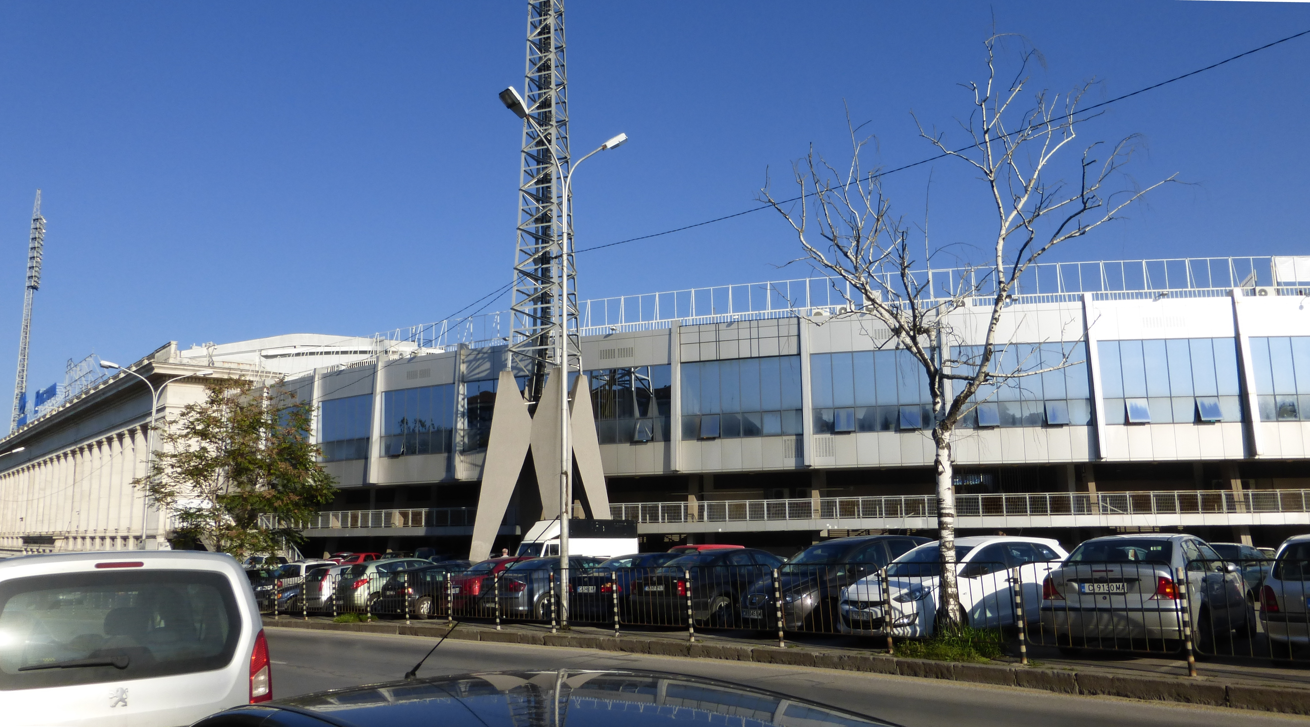 Национальный стадион «Васил Левски»